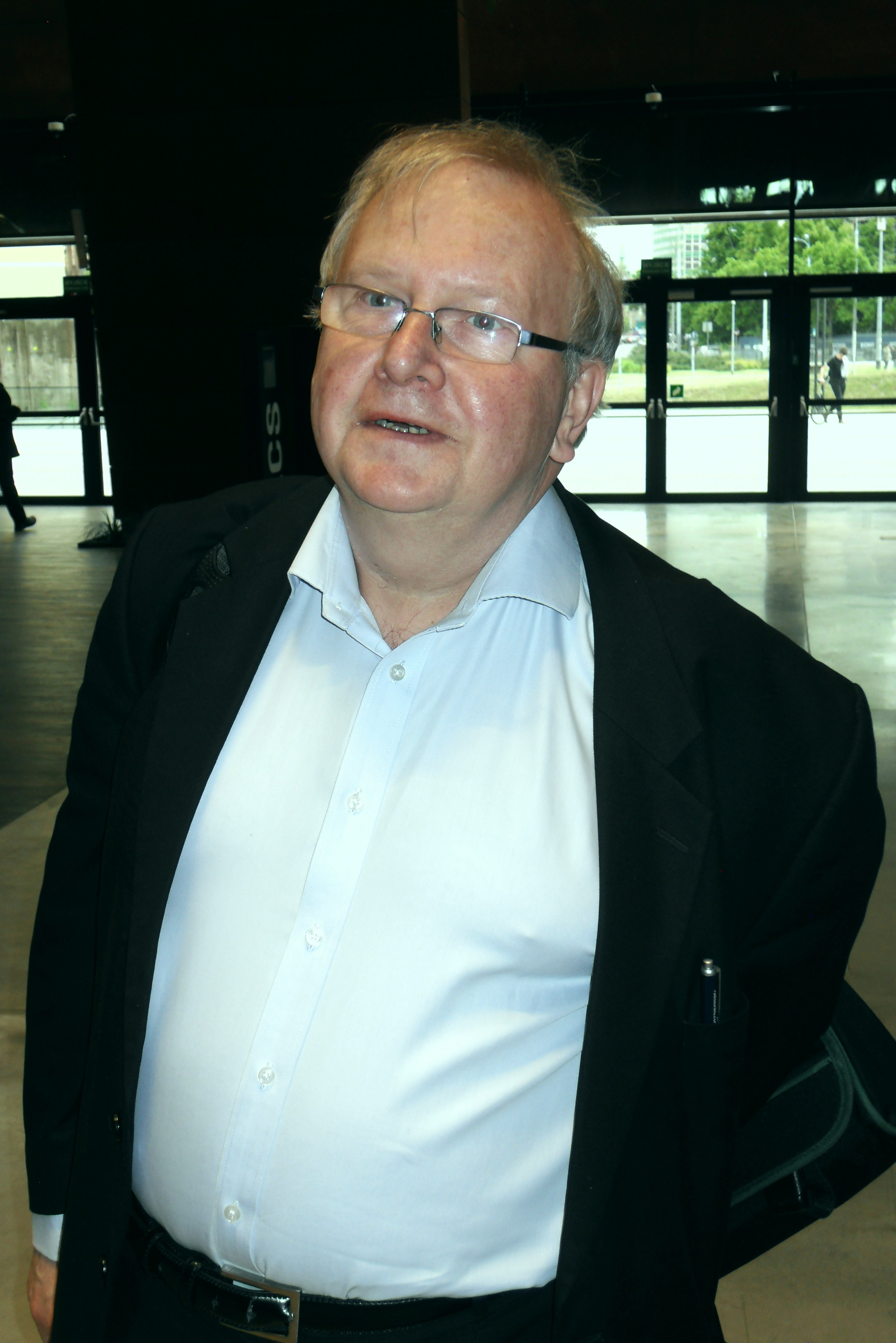 Aleksander Hall, gdański historyk i działacz polityczny.